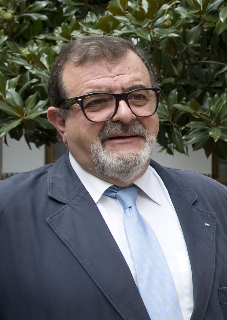 José Rodríguez de la Borbolla